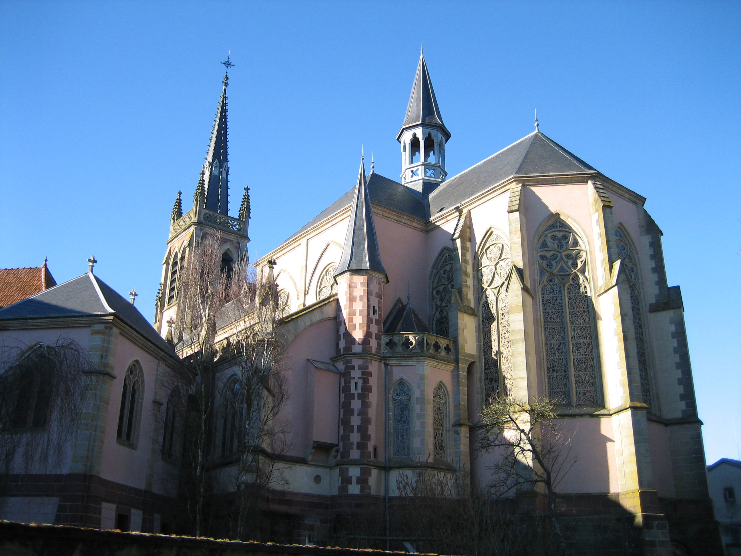 Basilique Saint-Pierre-Fourier de Mattaincourt (88) par Raphaël Tassin (raphdvoj) le 4 février 2007; vitraux de Gabriel Loire (voir Charles W. Pratt/Joan C. Pratt: Gabriel Loire. Les Vitraux/Stained Glass, Centre International de Vitrail, Chartres 1996, ISBN 2-90807704-3. p. 51